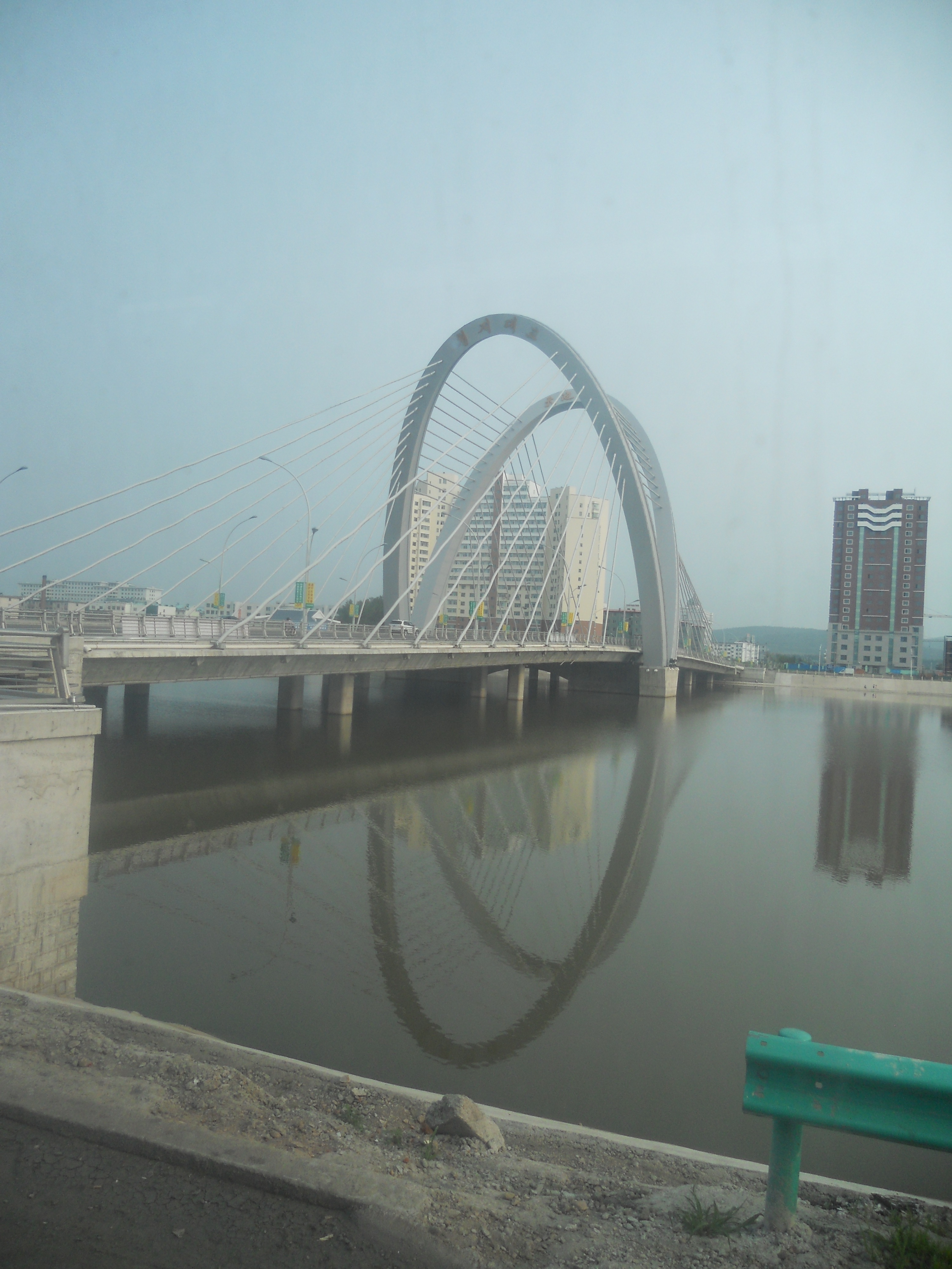 Yanji